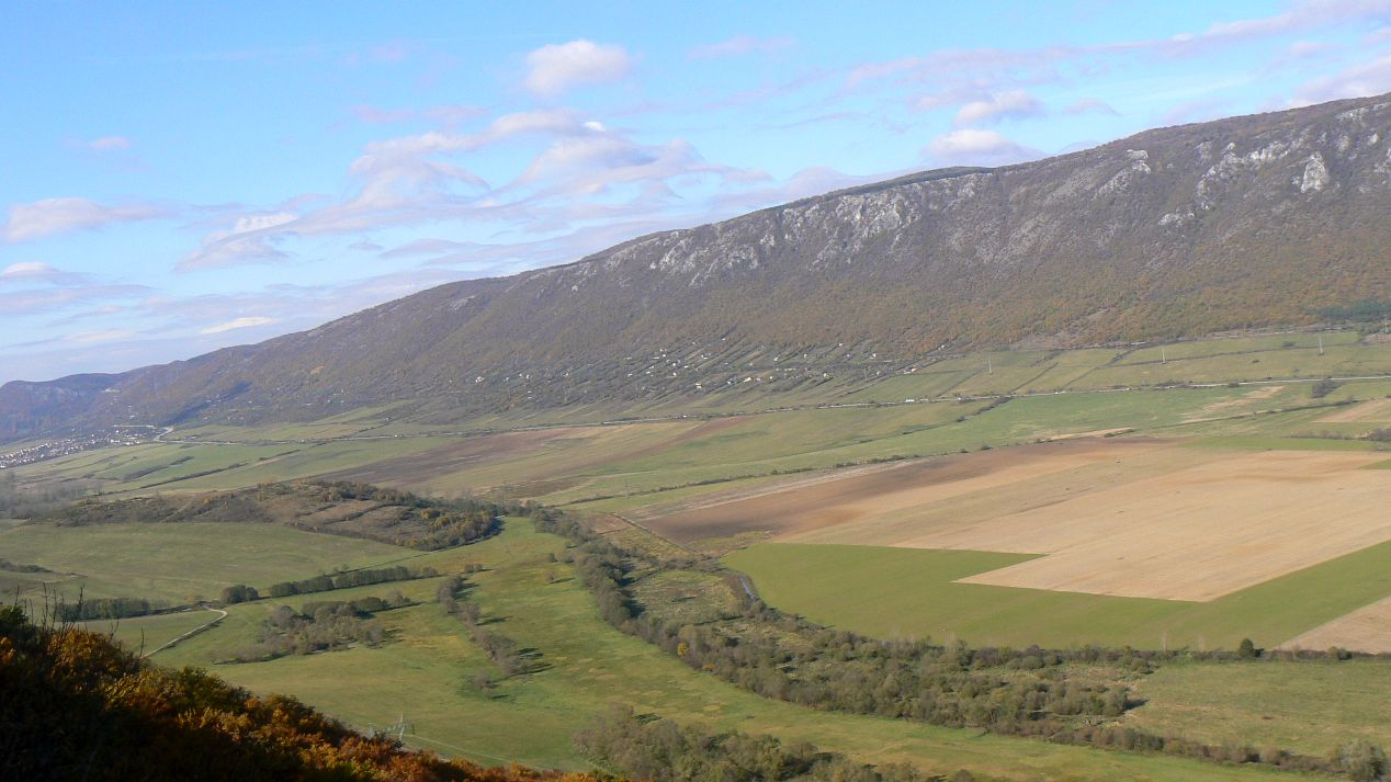 Juhozápadný svah planiny Horný vrch v Slovenskom krase s výrazne vyvinutým skalným reliéfom. Južné svahy planiny sa stáročia obhospodarovali; miestni obyvatelia tu zakladali vinice. V dĺžke cca 10 km svah svojou činnosťou výrazne premodelovali - počas mnohých generácií vinárov tu vznikli desiatky manuálne navŕšených akumulačných valov, ktoré pozostávajú z desiatok miliónov úlomkov vápencovej horniny. V popredí Turnianska kotlina.